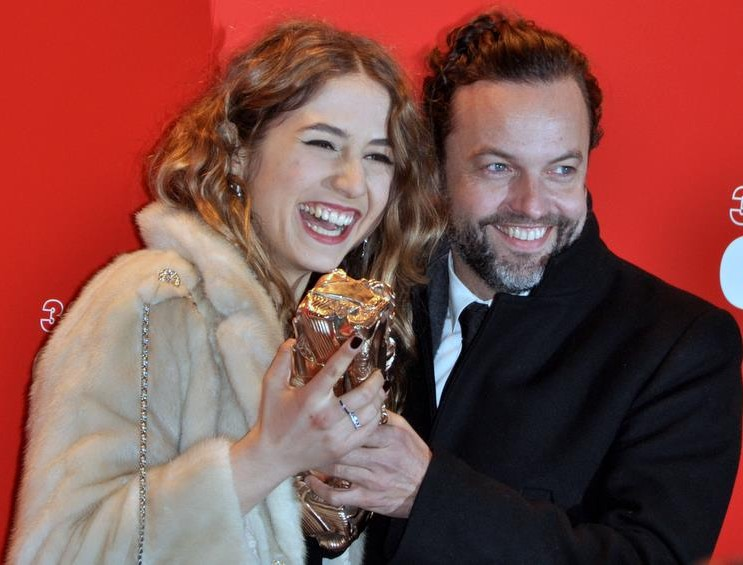 Izïa Higelin et Patrick Mille à la cérémonie des César